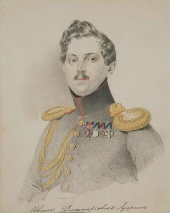 Лужин, Иван Дмитриевич (1804-1868), флигель-адъютант Николая I, полковник л.-гв. Конного полка, впоследствии обер-полицмейстер Москвы.